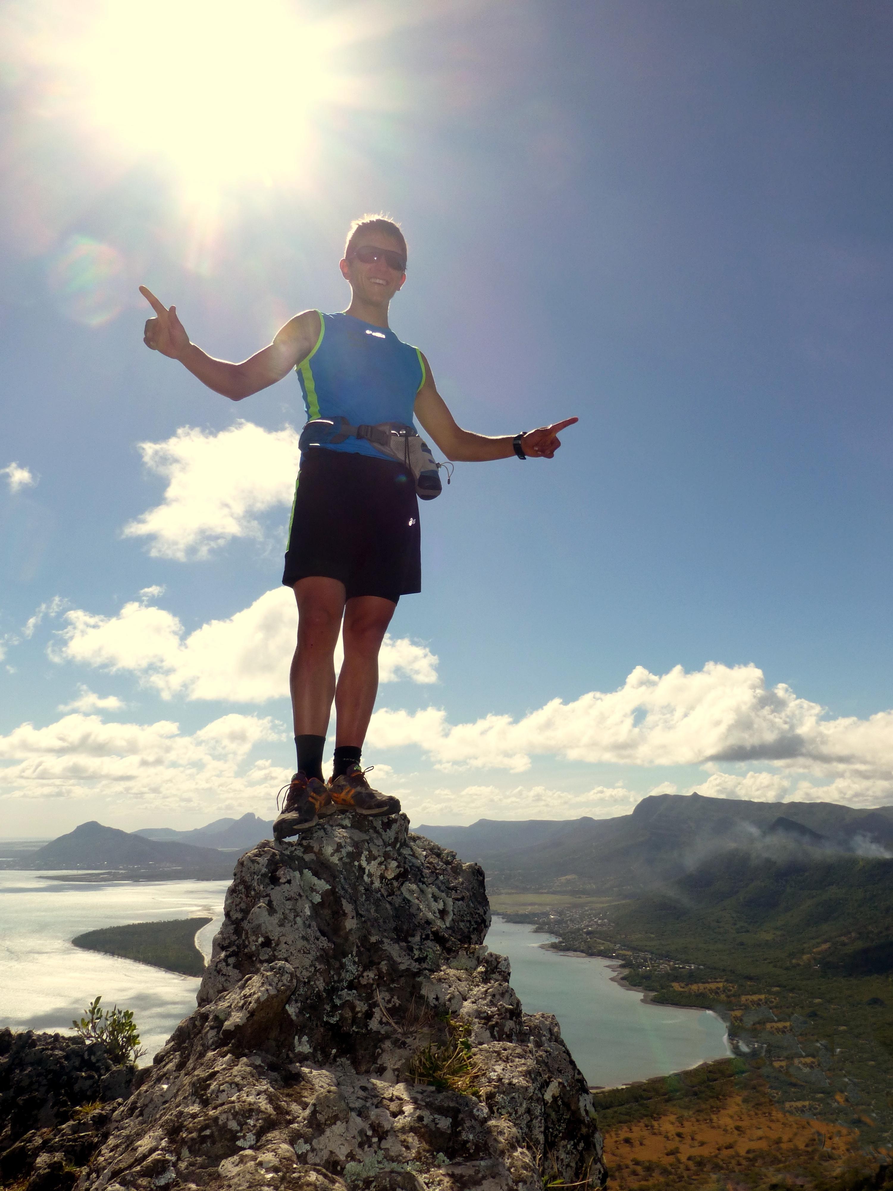 Xavier au sommet du Morne Brabant, à l'Ile Maurice, un peu moins de deux mois avant de gagner l'UTMB et sa place parmi les grands noms du trail mondial.